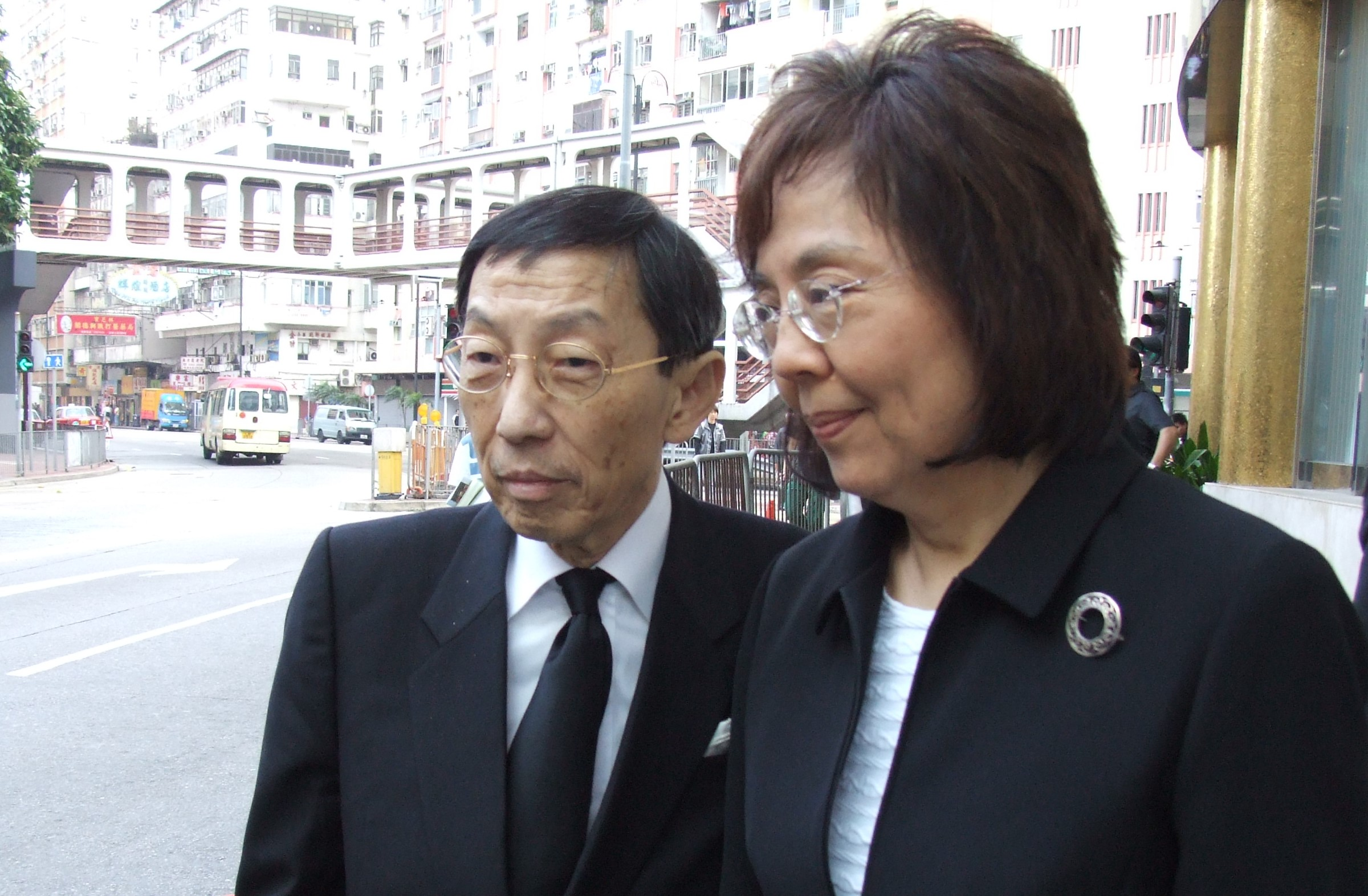 出席喪禮的黃應士（圖左）及其夫人